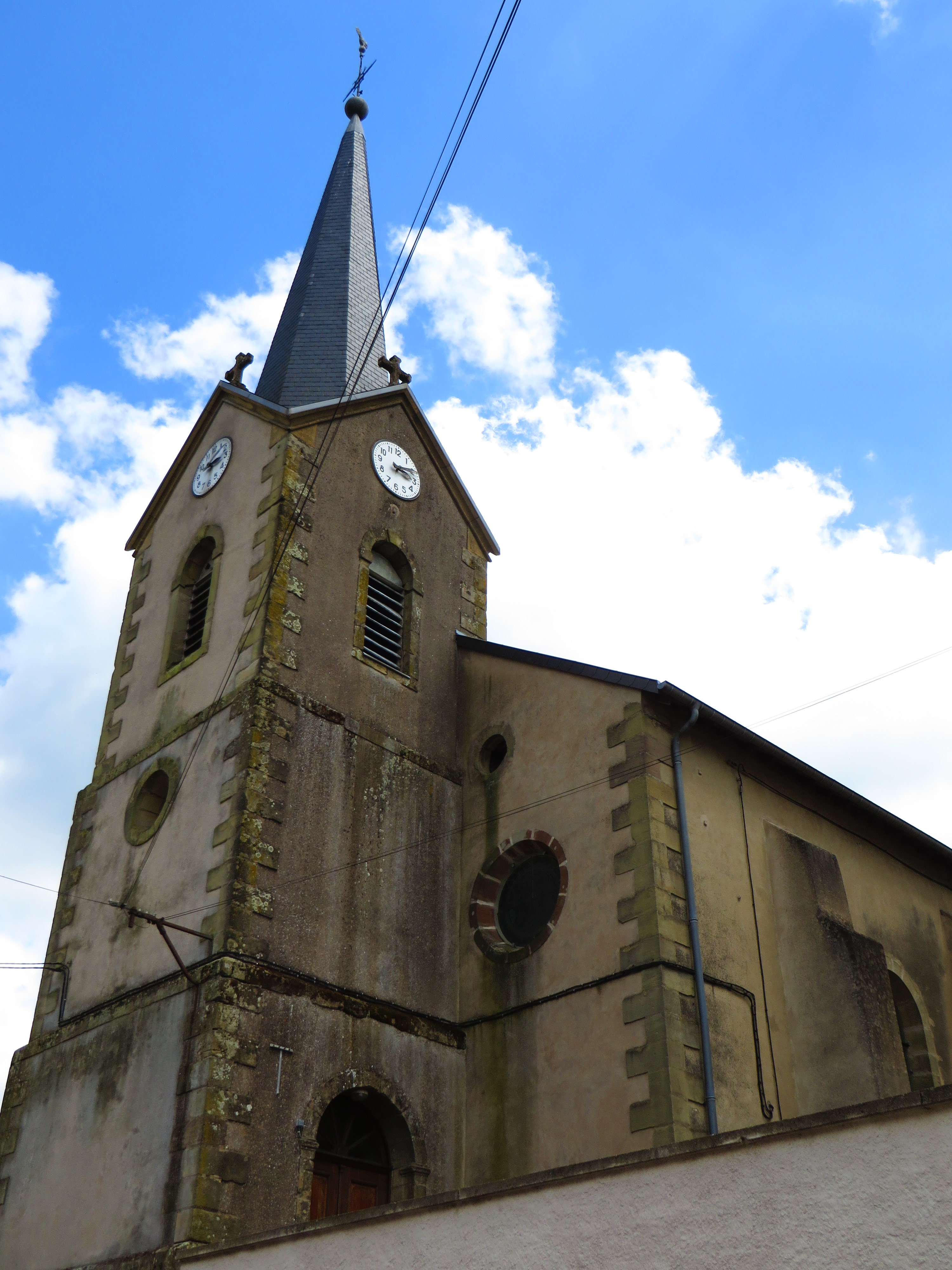 Zimming eglise